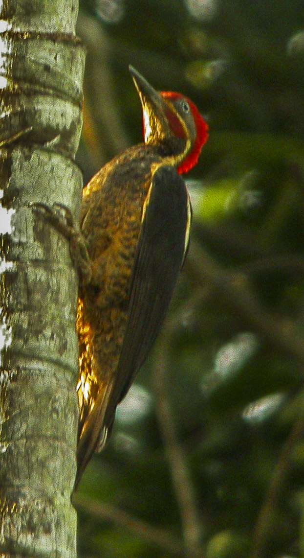 Guayaqil Woodpecker (Campephilus gayaquilensis) - Ecuador 05 dgs(3)